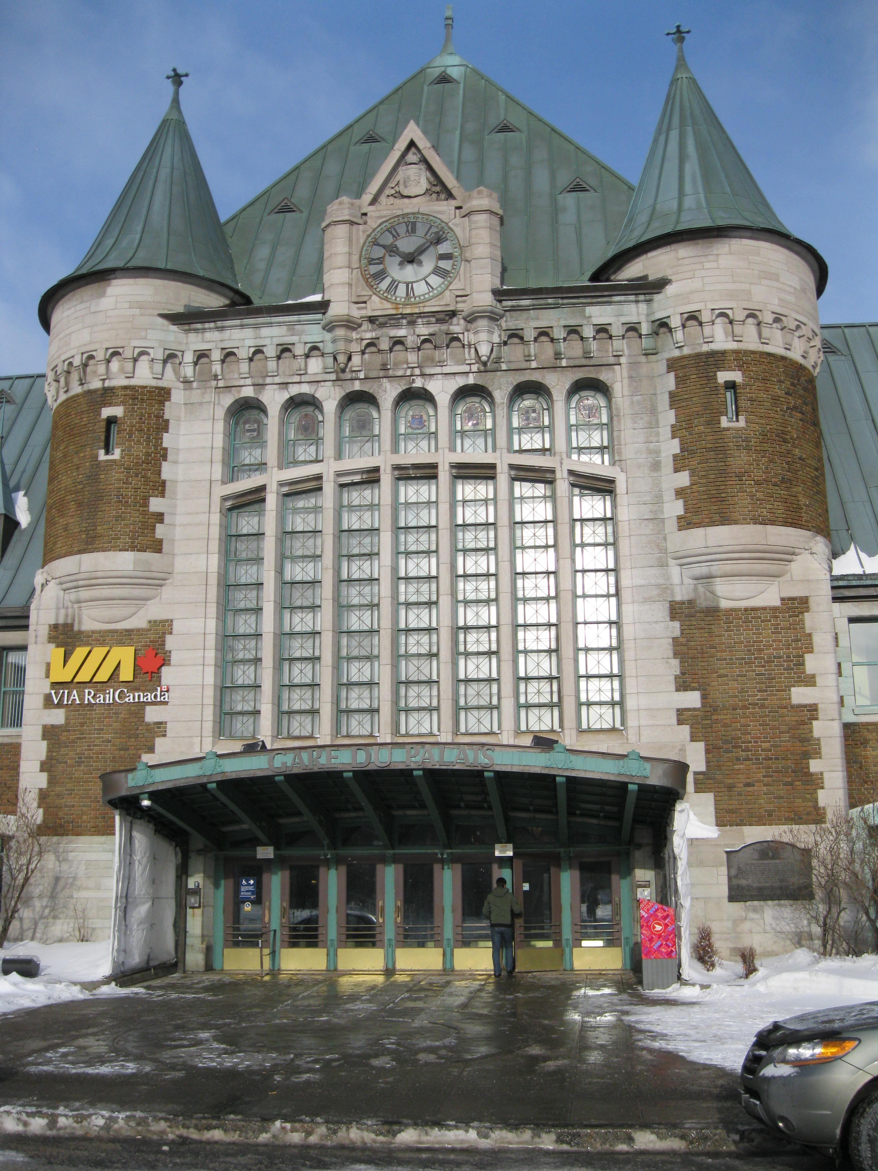 Gare du Palais de Québec